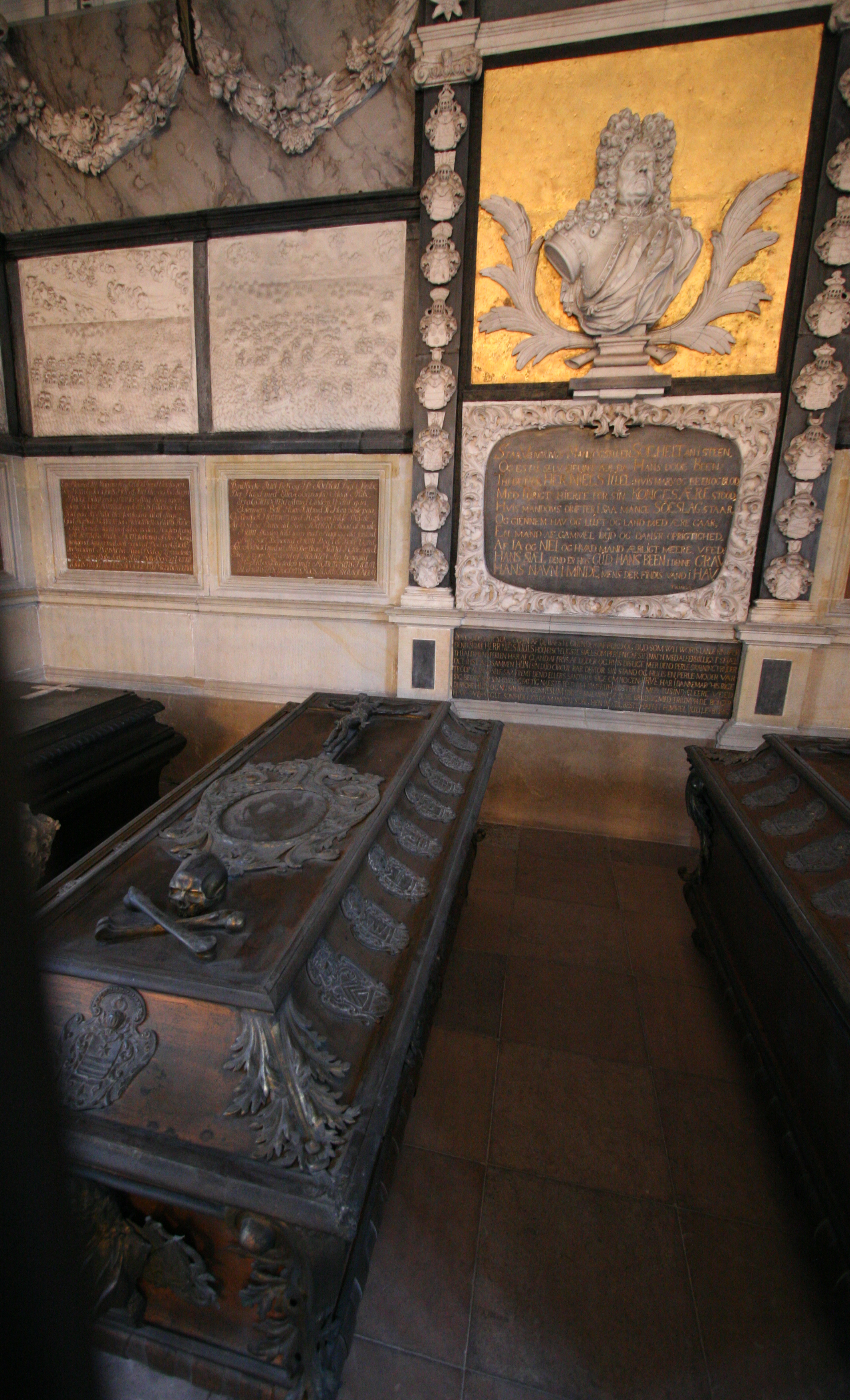 Holmens Kirke, Copenhagen, Denmark . Niels Juels sarkofag.